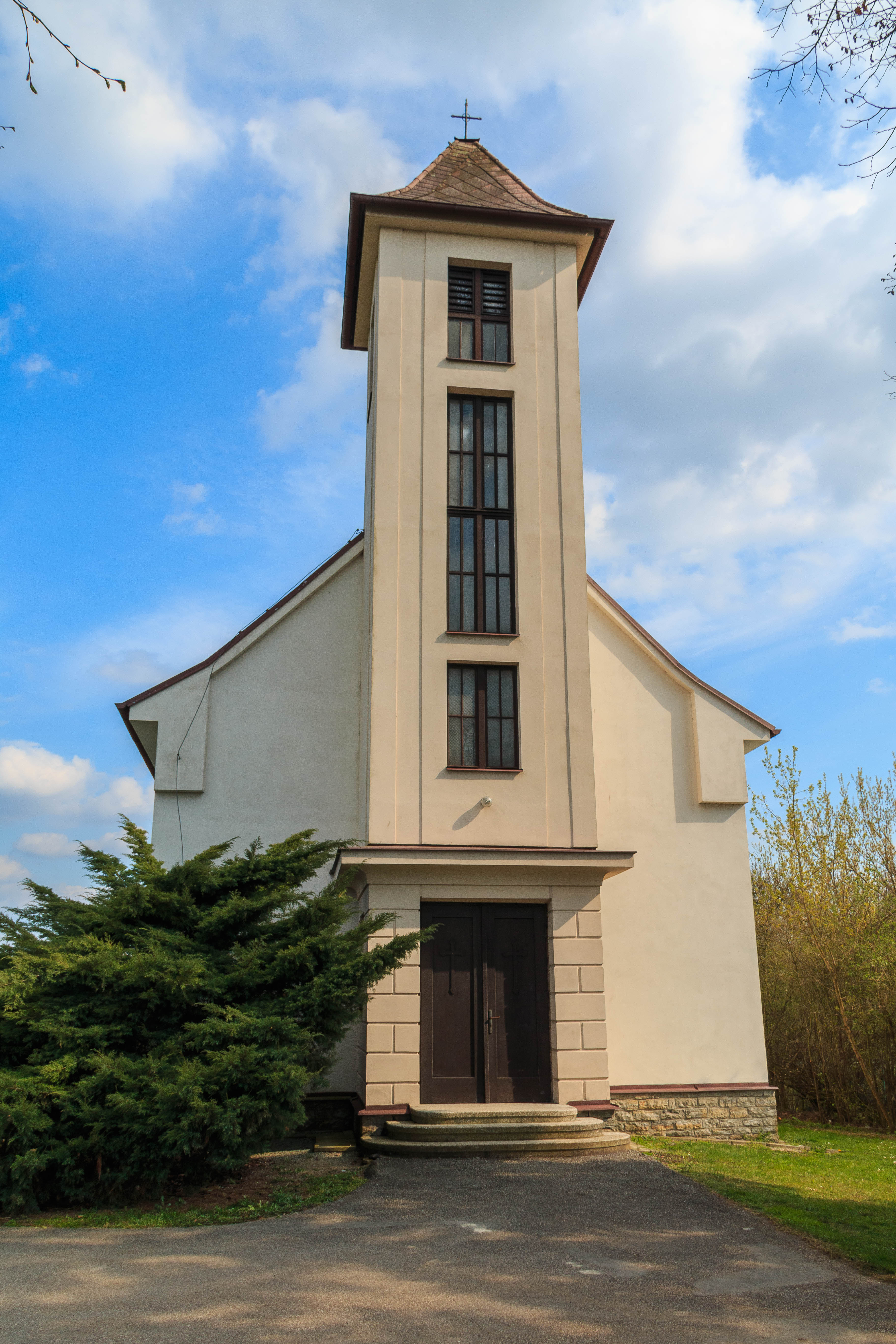 Lhota u Náhořan kaple